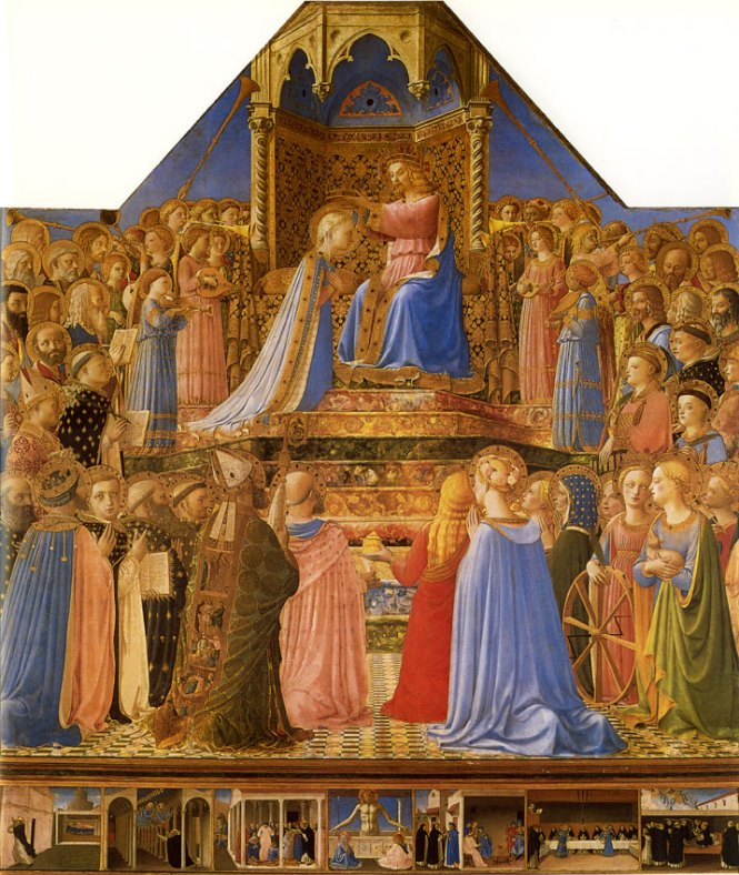 Au premier plan, de gauche à droite, on reconnaît : saint Louis de France à sa couronne fleurdelisée ; saint Nicolas de Bari, la tête coiffée d'une mitre, enveloppé d'une lourde chape brodée, trois boules d'or à ses pieds ; sainte Madeleine vêtue de rouge, les cheveux défaits tenant un vase à parfum ; sainte Catherine d'Alexandrie avec la roue de son martyre et sainte Agnès serrant un agneau contre sa poitrine.